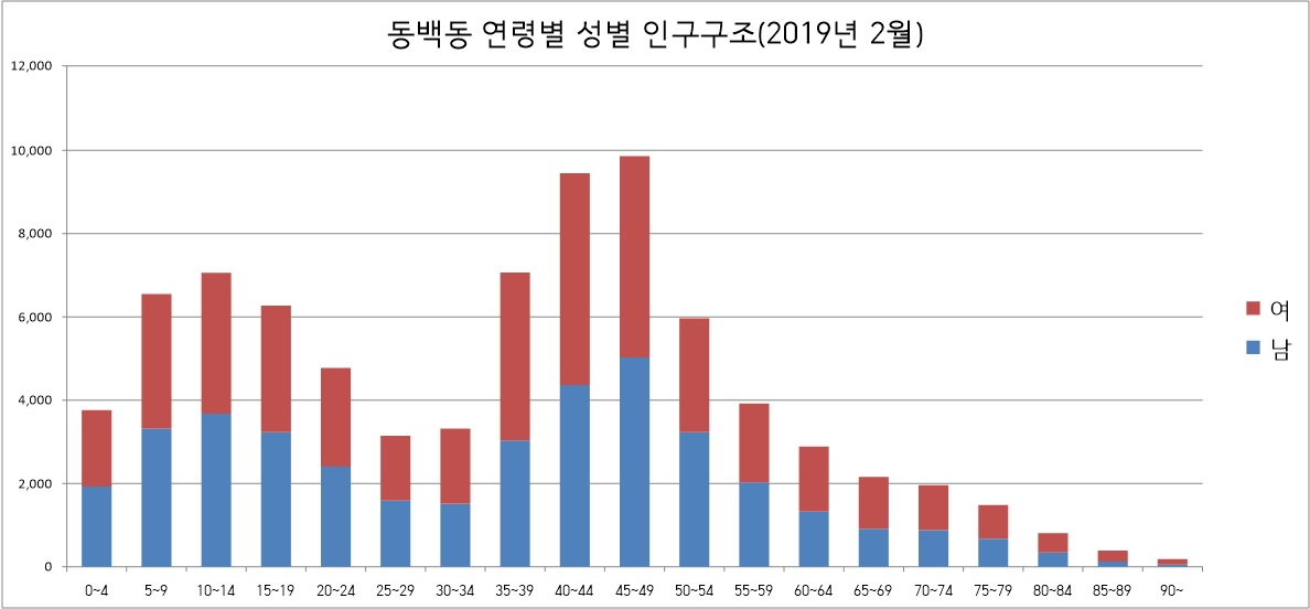 용인시 동백동 성별 연령별 인구구조